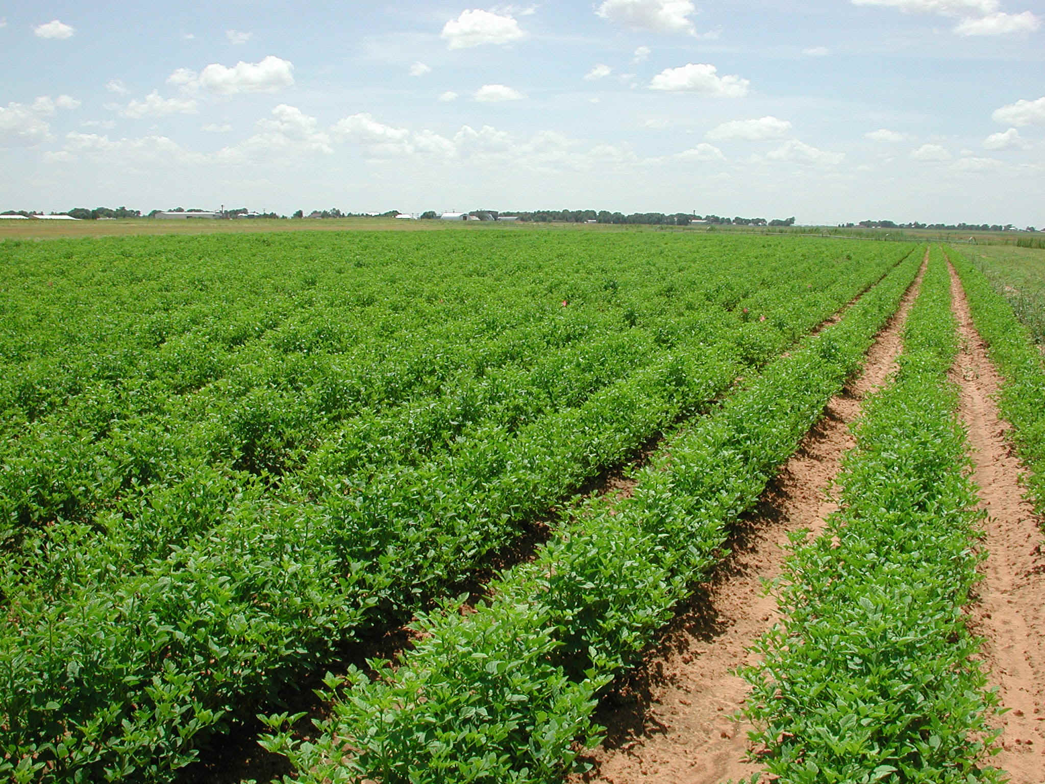 aalo ka bagh